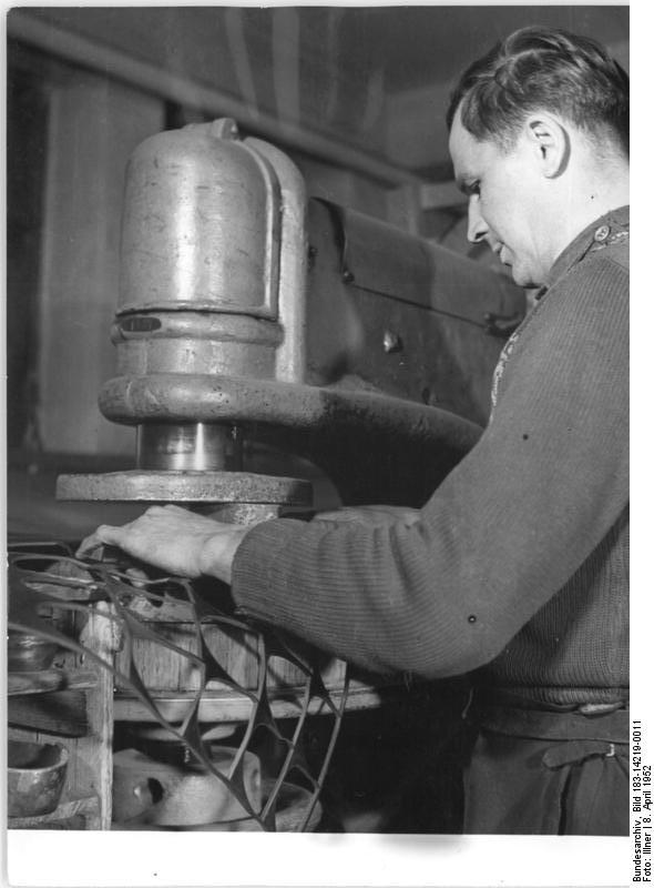 Industriearbeiter Maschine bedienend Zentralbild Illner 8.4.52. Aus der Produktion der Bella-Schuhfabrik in Groitzsch b. Leipzig Die Bella-Schuhfabrik steht -um ihre Produktion ständig zu verbessern- im Wettbewerb mit verschiedenen Schuhfabriken der DDR, u.a. mit der VVB-Elbe, VVB-Halle, der Schuhfabrik "Banner des Friedens" in Weissenfels und den Vereinigten Burger Schuhbetrieben. UBz: Beim Stanzen des Boden-Materials kommt es besonders auf hohe Materialausnutzung an. Stanzer Kurt Vogel von der Brigade Erler stanzt Gummiflecke.